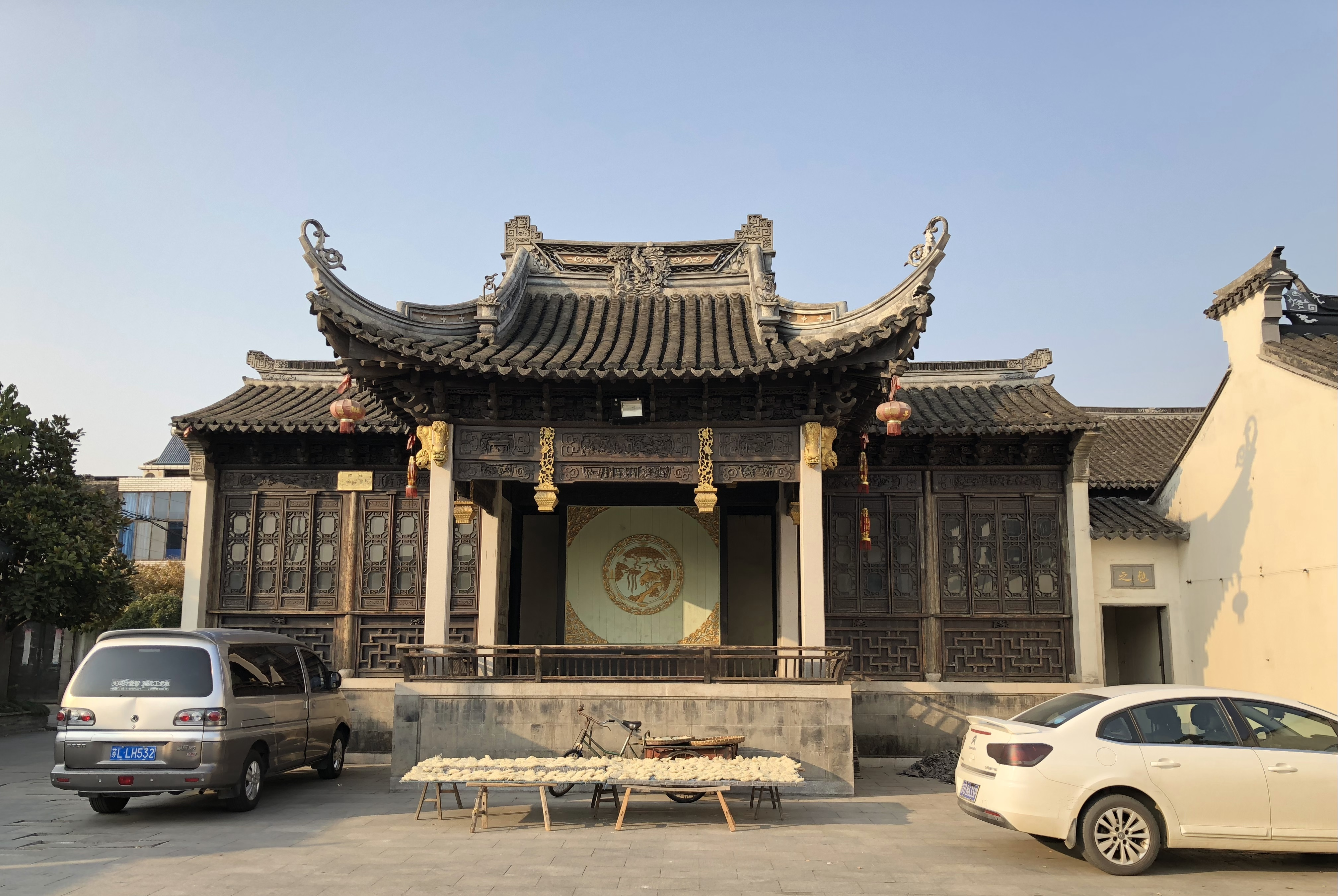 中文（中国大陆）: 礼社村 古戏台